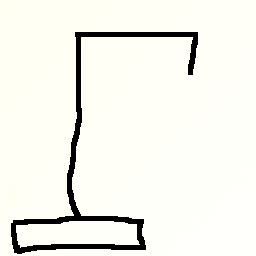 Imágen base para el ahorcado El dibujo base para jugar al ahorcado. Dibujado por mí utilizando el GIMP v2.0.